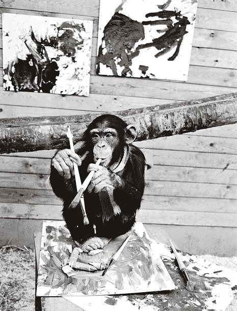 pivture